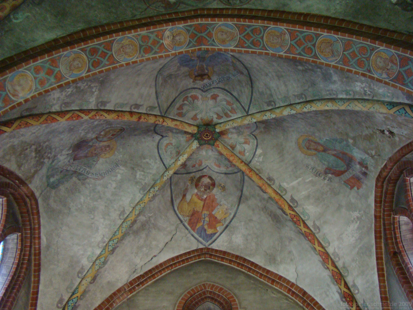 Malereien im Chorgewölbe der Marienkirche in Gnoien